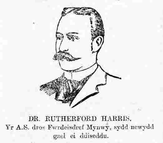 Dr Rutherfoord Harris